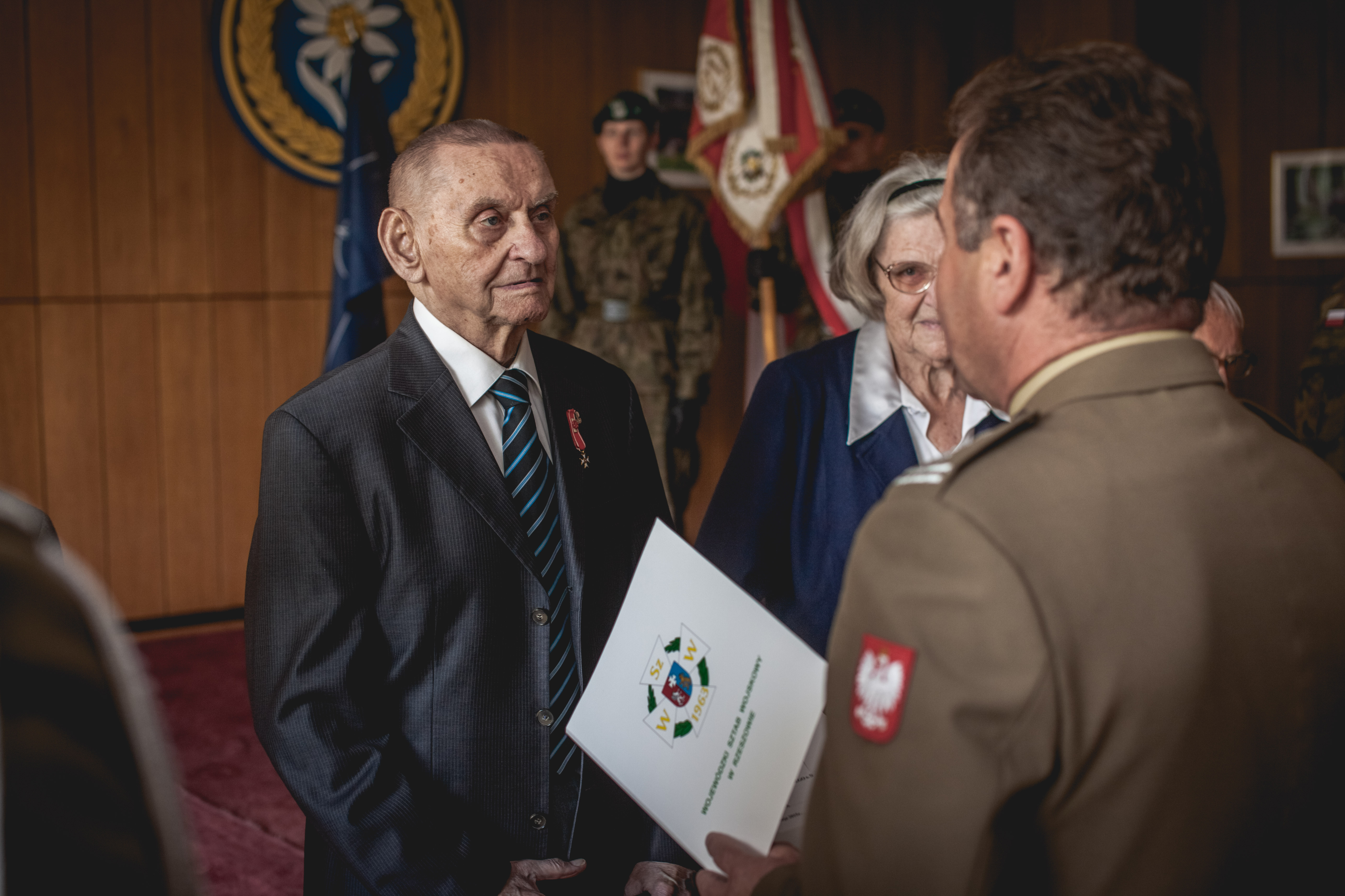 Aleksander Szymański podczas wręczenia awansów, Rzeszów, 1 lipca 2015 r.